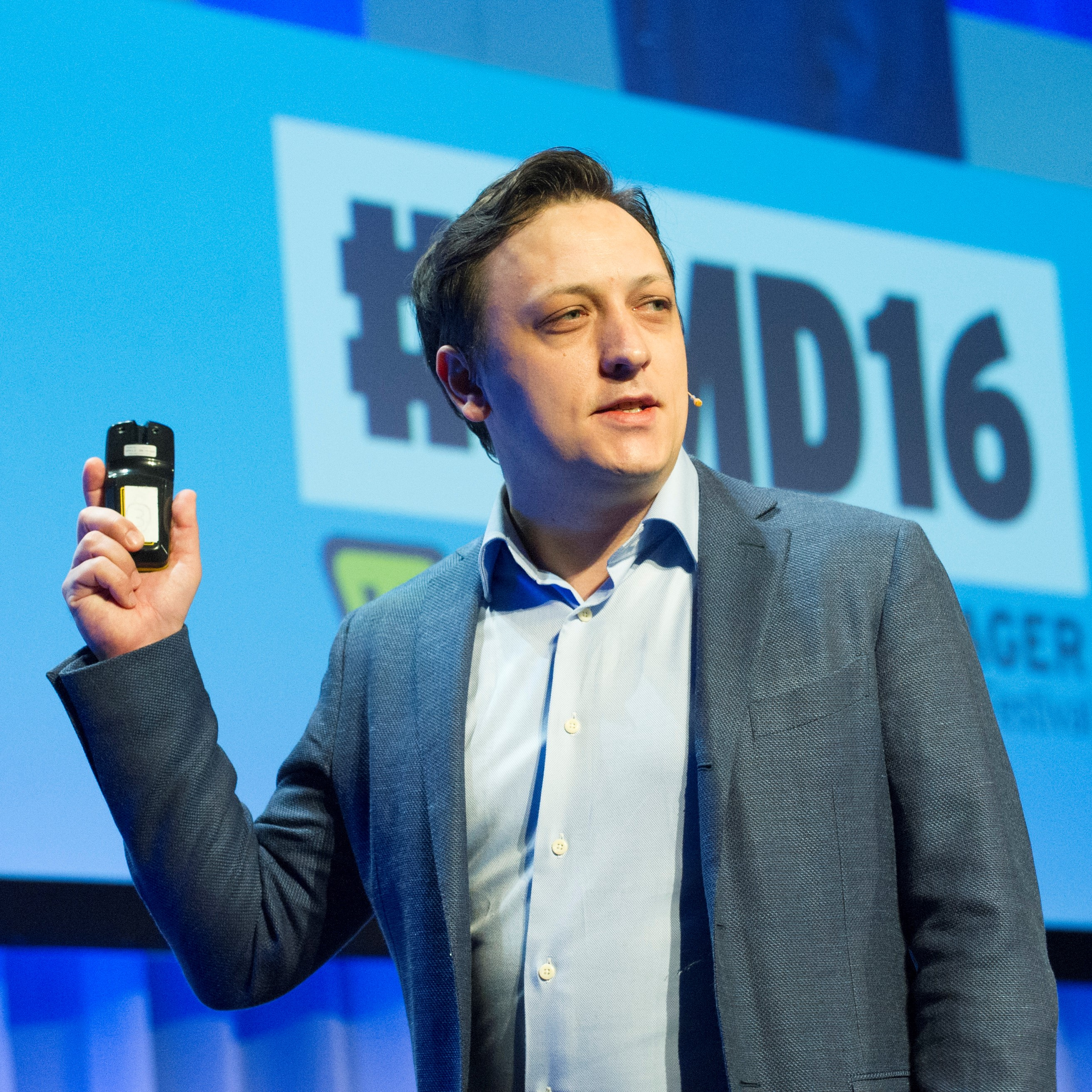 Medvirkende: Ben Thompson